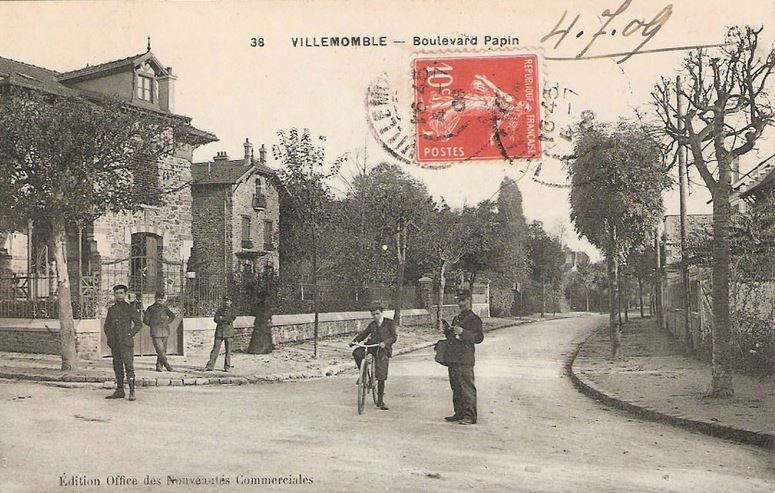 Villemomble.Boulevard Papin